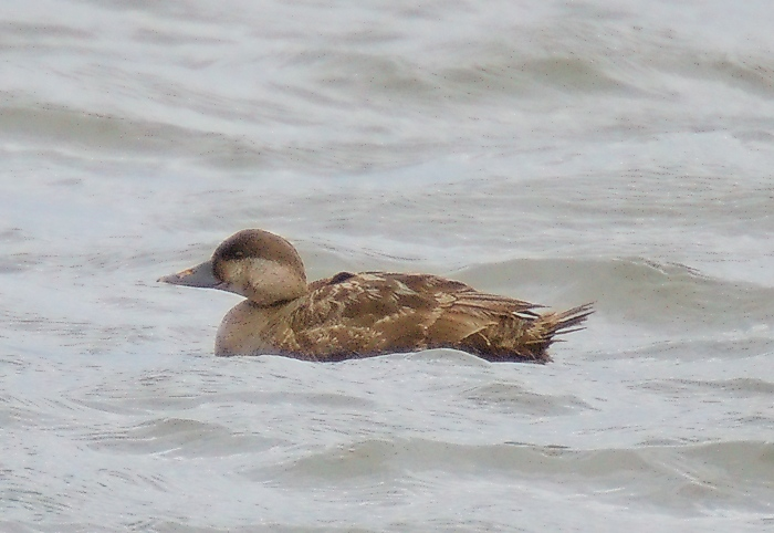 Scientific name: Melanitta nigra (female)